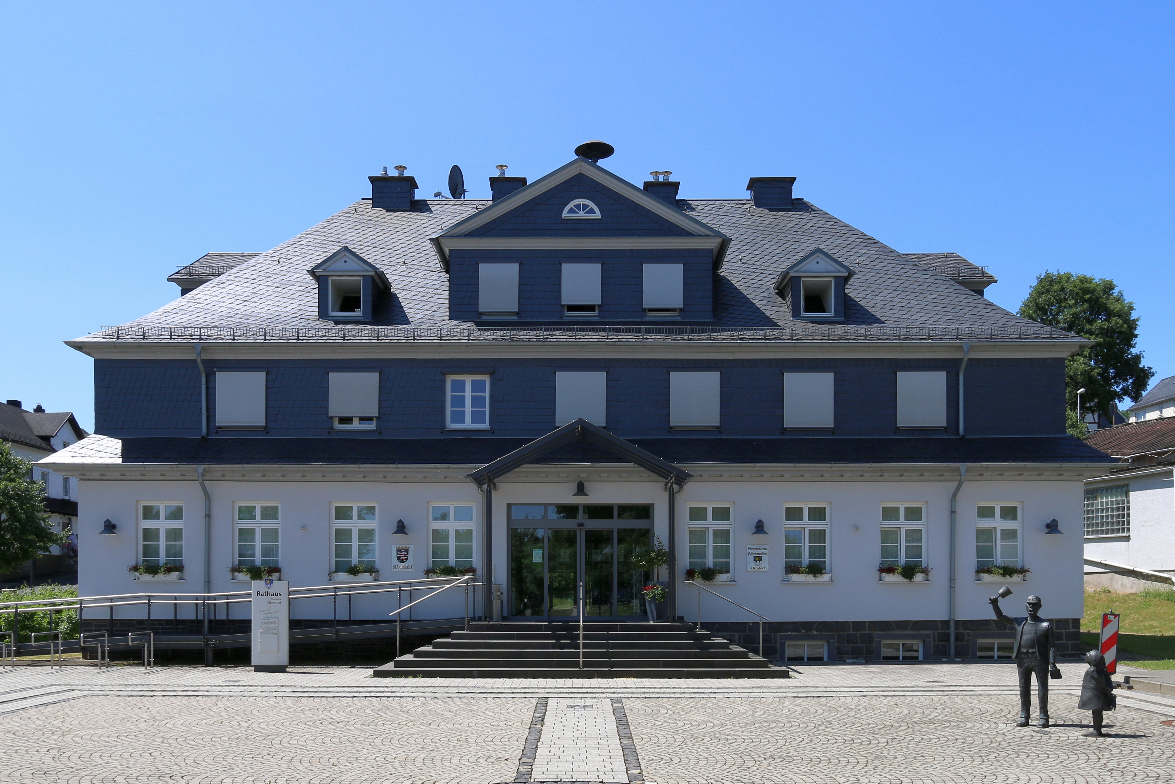 Driedorf, Lahn-Dill-Kreis: Rathaus